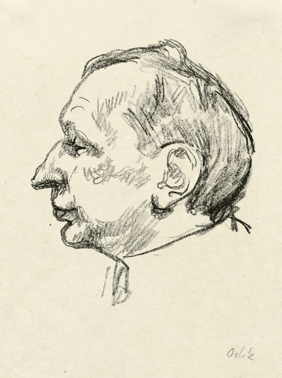 Felix Hollaender; Lithographie auf gelblichem Similijapan. 12,7 x 10,7 cm (Darstellung); 23 x 14,8 cm (Blattgröße). Signiert.